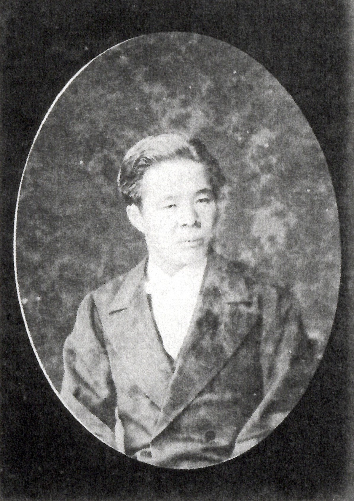 戸田忠綱の肖像写真。